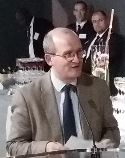 Discours de Louis Faivre d'Arcier. Personality rights warningAlthough this work is freely licensed or in the public domain, the person(s) shown may have rights that legally restrict certain re-uses unless those depicted consent to such uses. In these cases, a model release or other evidence of consent could protect you from infringement claims.